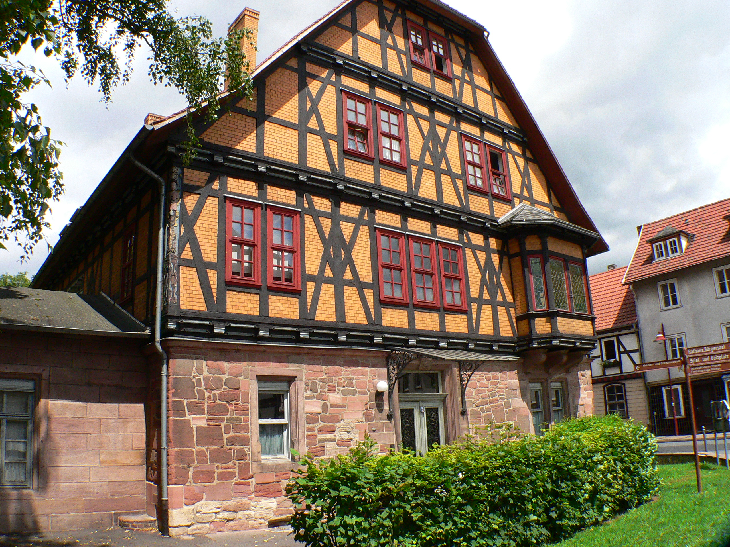 Deutschland, Hessen: Wanfried an der Werra, Keudell'sches Schloss